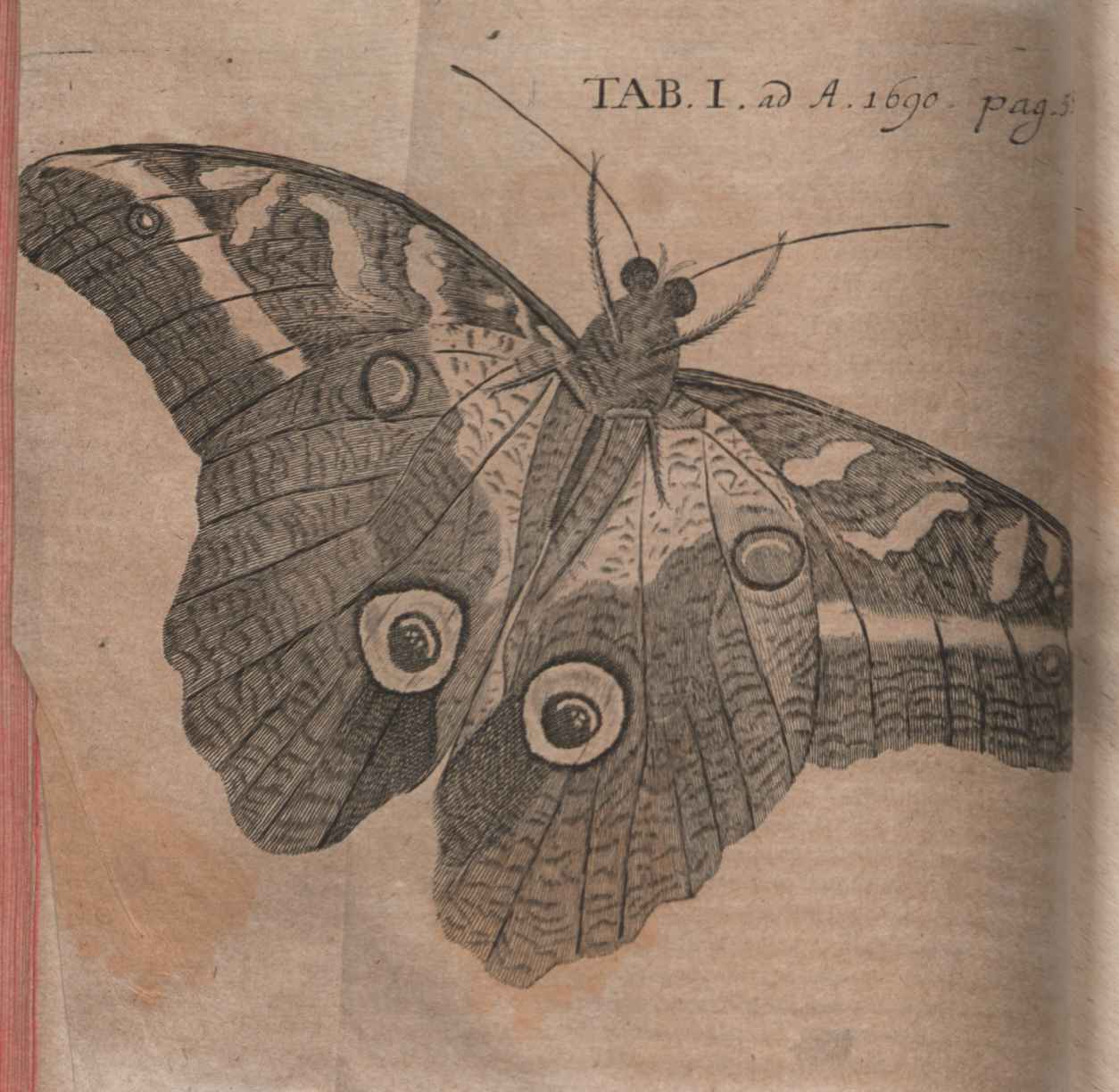 Illustration